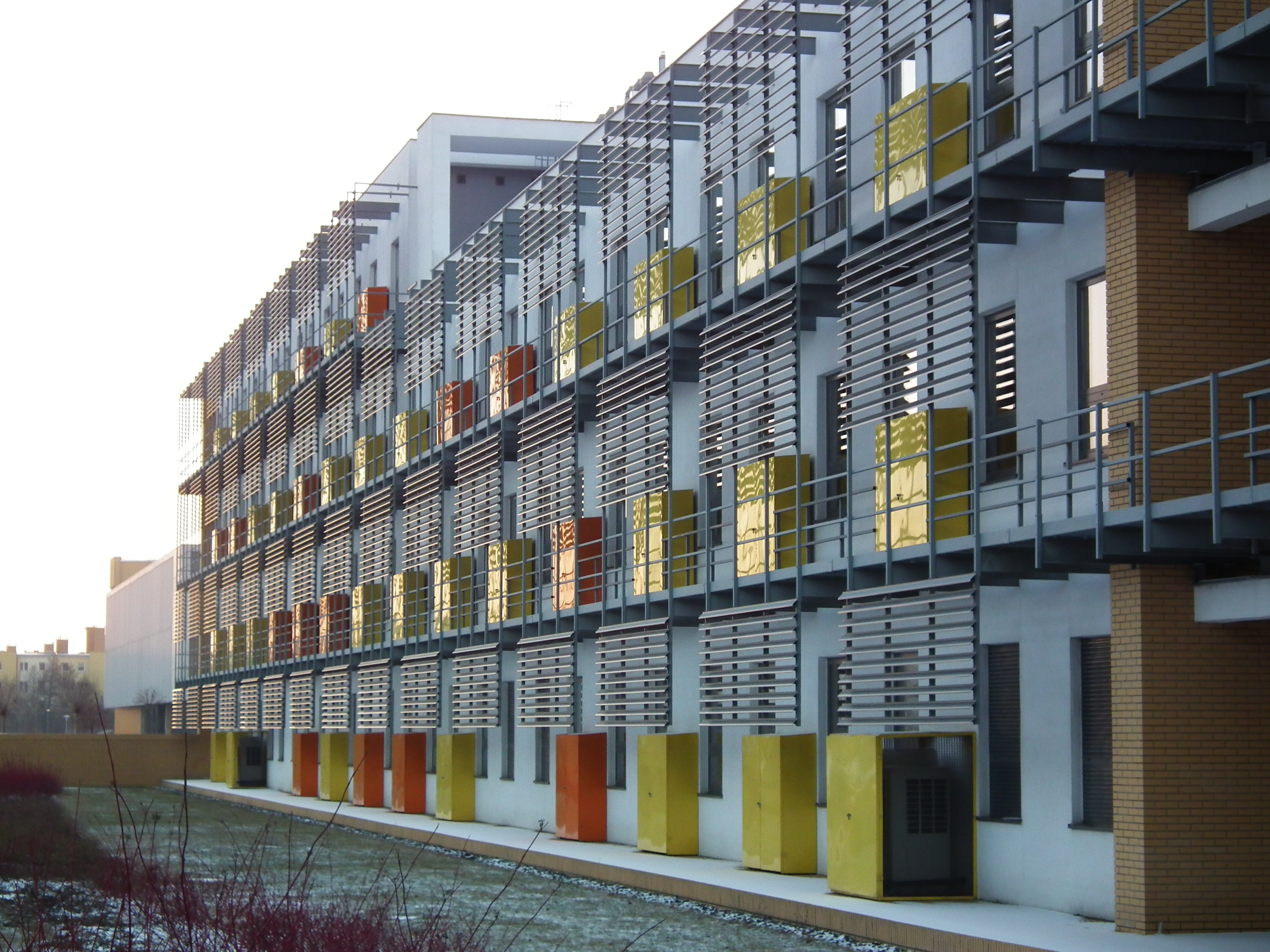 Collegium Chemicum Novum - Campus Morasko, Poznań (UAM).